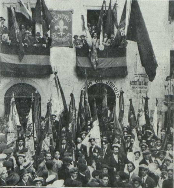 Circulo Tradicionalista de Capellades (1915)